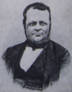 Kép:Camillo Benso conte di Cavour.JPG